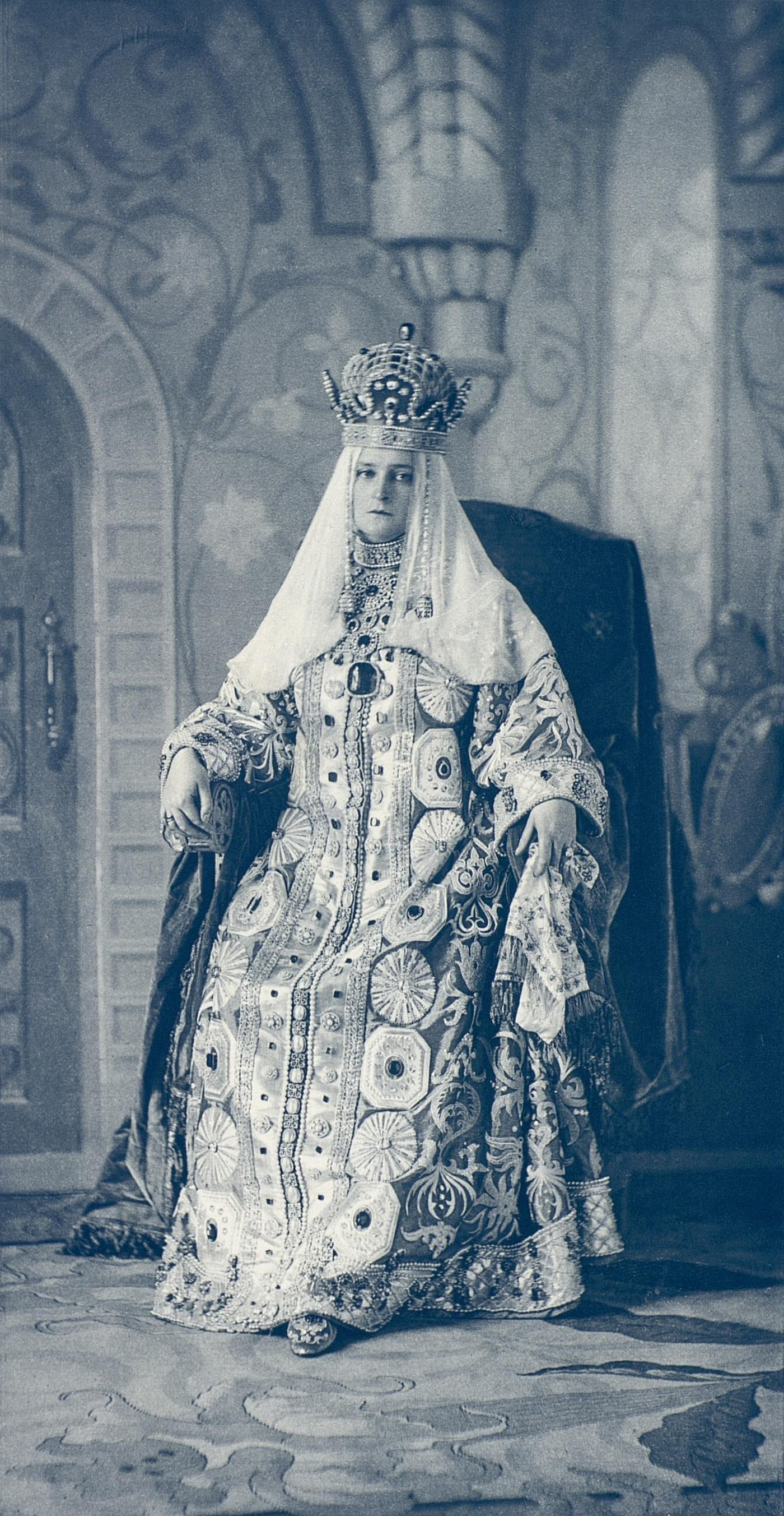 Императрица Александра Федоровна в костюме царицы Марии Ильиничны